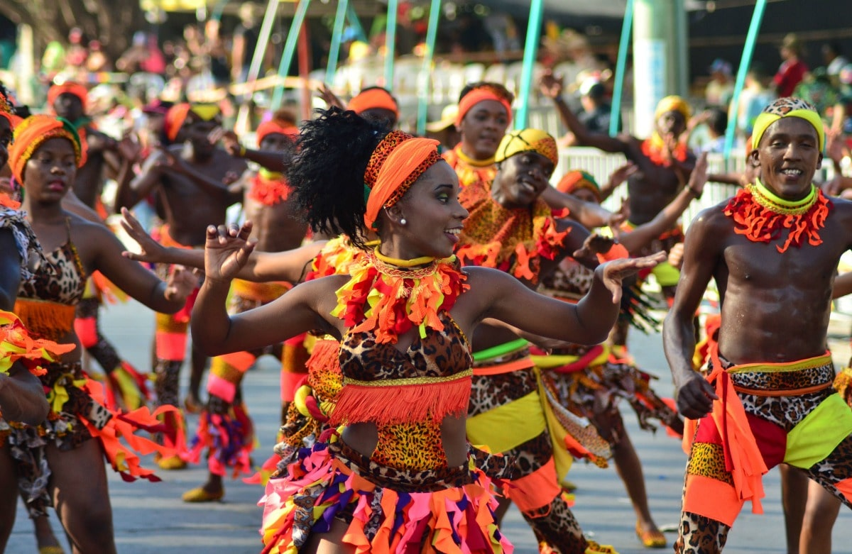 רקדנים רוקדים את ריקוד המפלה